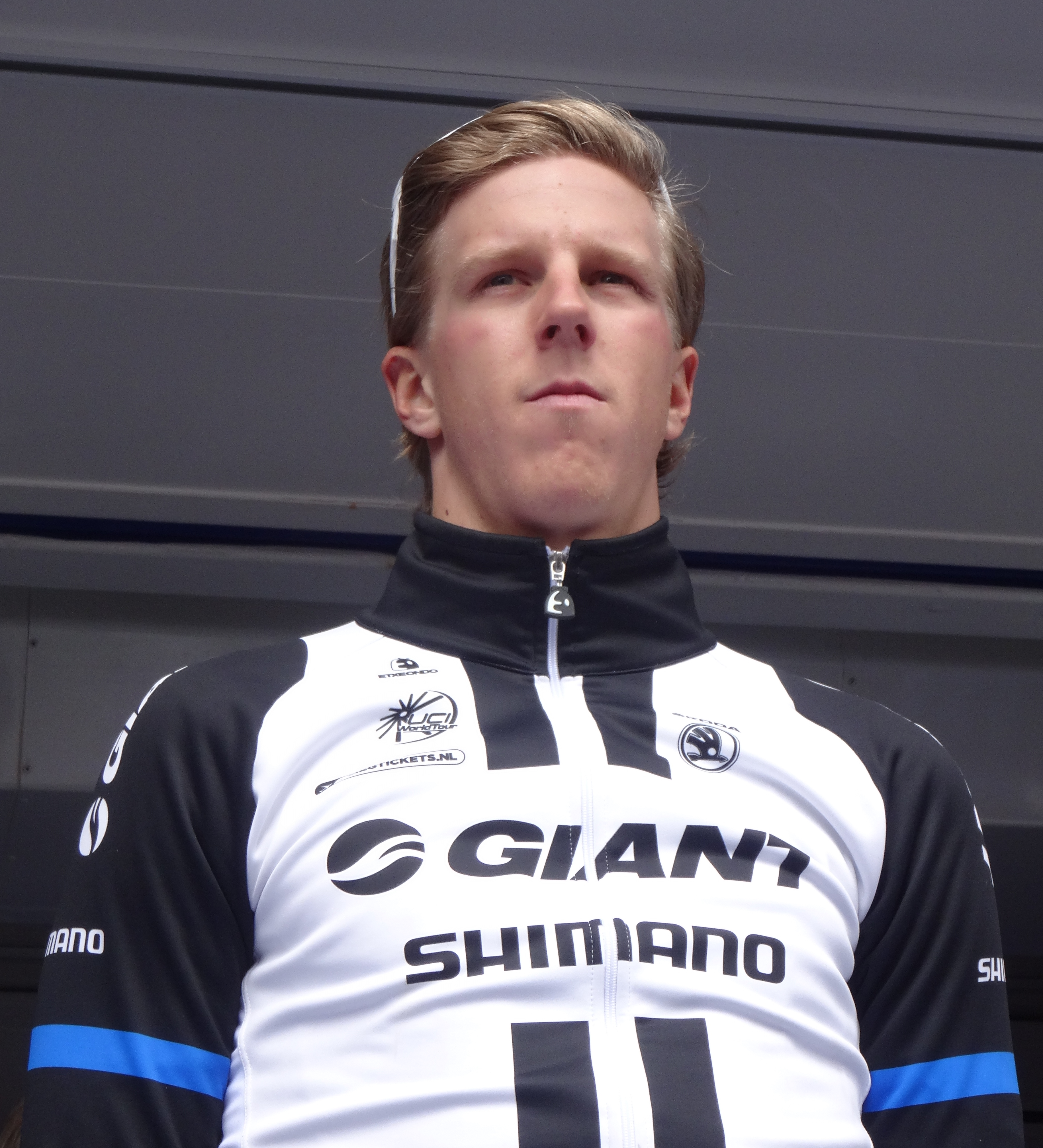 Reportage photographique réalisé le mercredi 7 mai 2014 au départ de la première étape de l'édition 2014 des Quatre jours de Dunkerque à Dunkerque, Nord, Nord-Pas-de-Calais, France. Depicted person: Jonas Ahlstrand Depicted team: Giant-Shimano